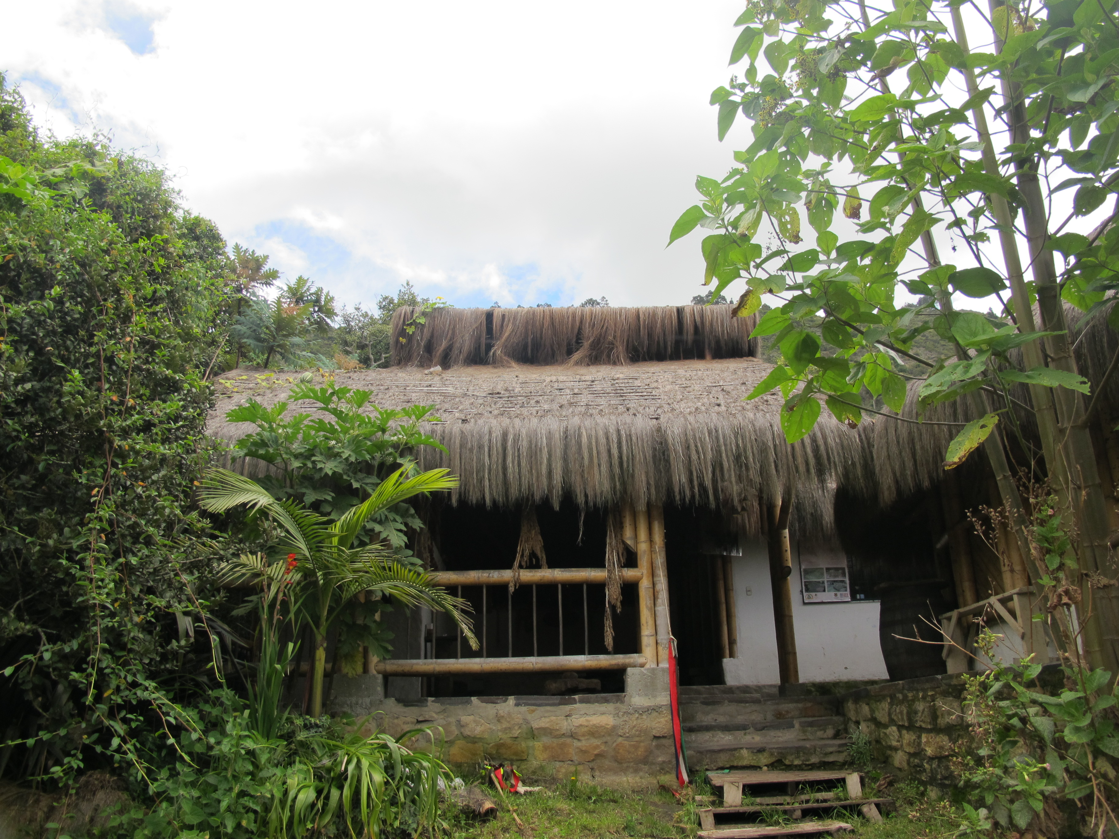 Ubicación: COTA, CUNDINAMARCA